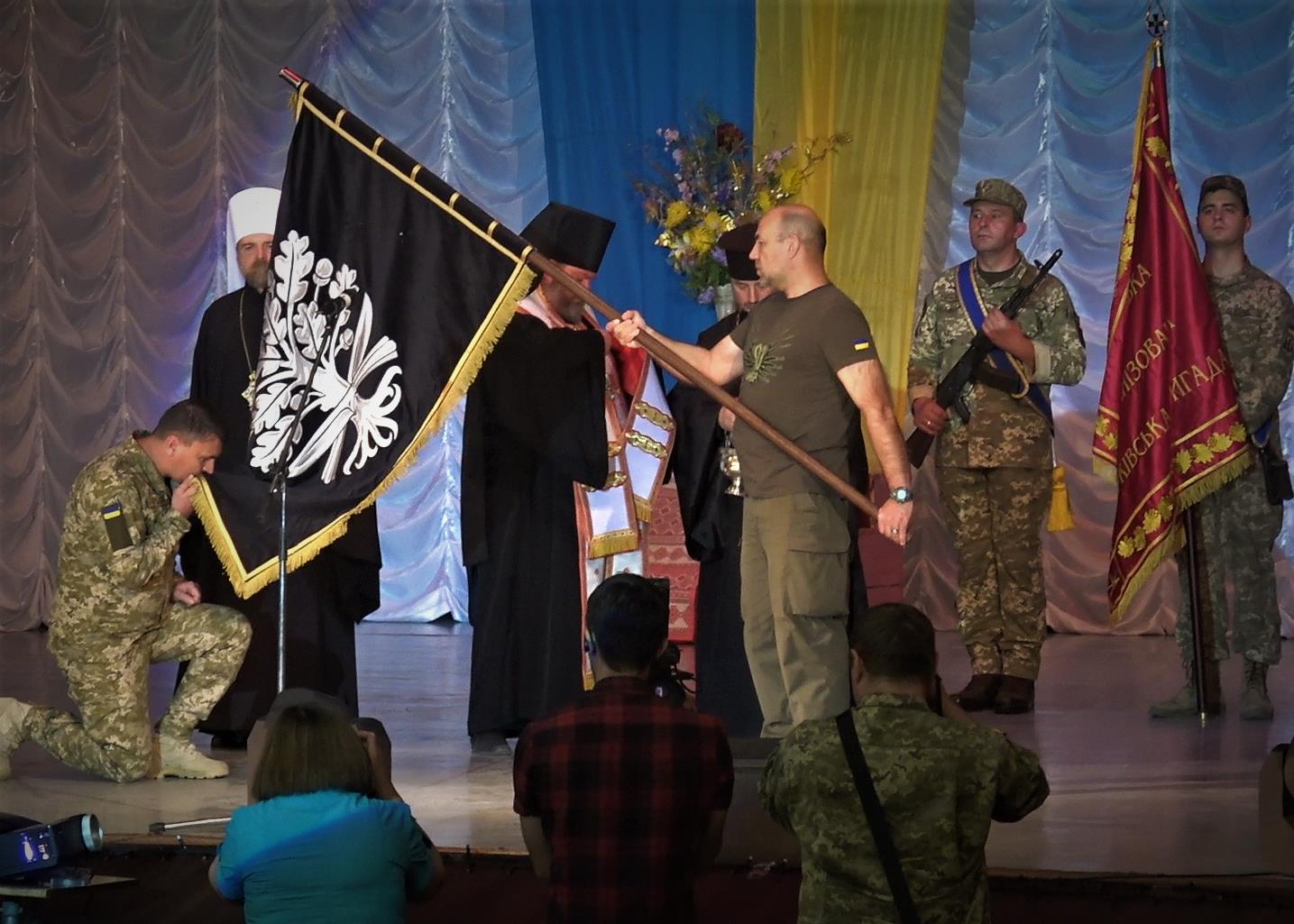 В день 75-ти річчя 93-ї ОМБр освятили та вручили командиру бригади, полковнику Владиславу Клочкову, мотиваційний прапор